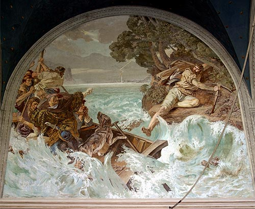 Fresko "Tells Sprung" in der Tellskapelle (Nr. 03.1-8799), Ernst Stückelberg (1831–1903) Alternative namesJohann Melchior Ernst StickelbergerDescription Swiss painter Date of birth/death21 February 183114 September 1903Location of birth/deathBaselidemWork locationBern, Antwerp, Munich, Rome, Zurich, Basel, Sisikon UR (Urnersee)Authority control VIAF: 74648745 LCCN: nr95005764 GND: 118756206 ULAN: 500009186 ISNI: 0000 0001 1071 1613 WorldCat